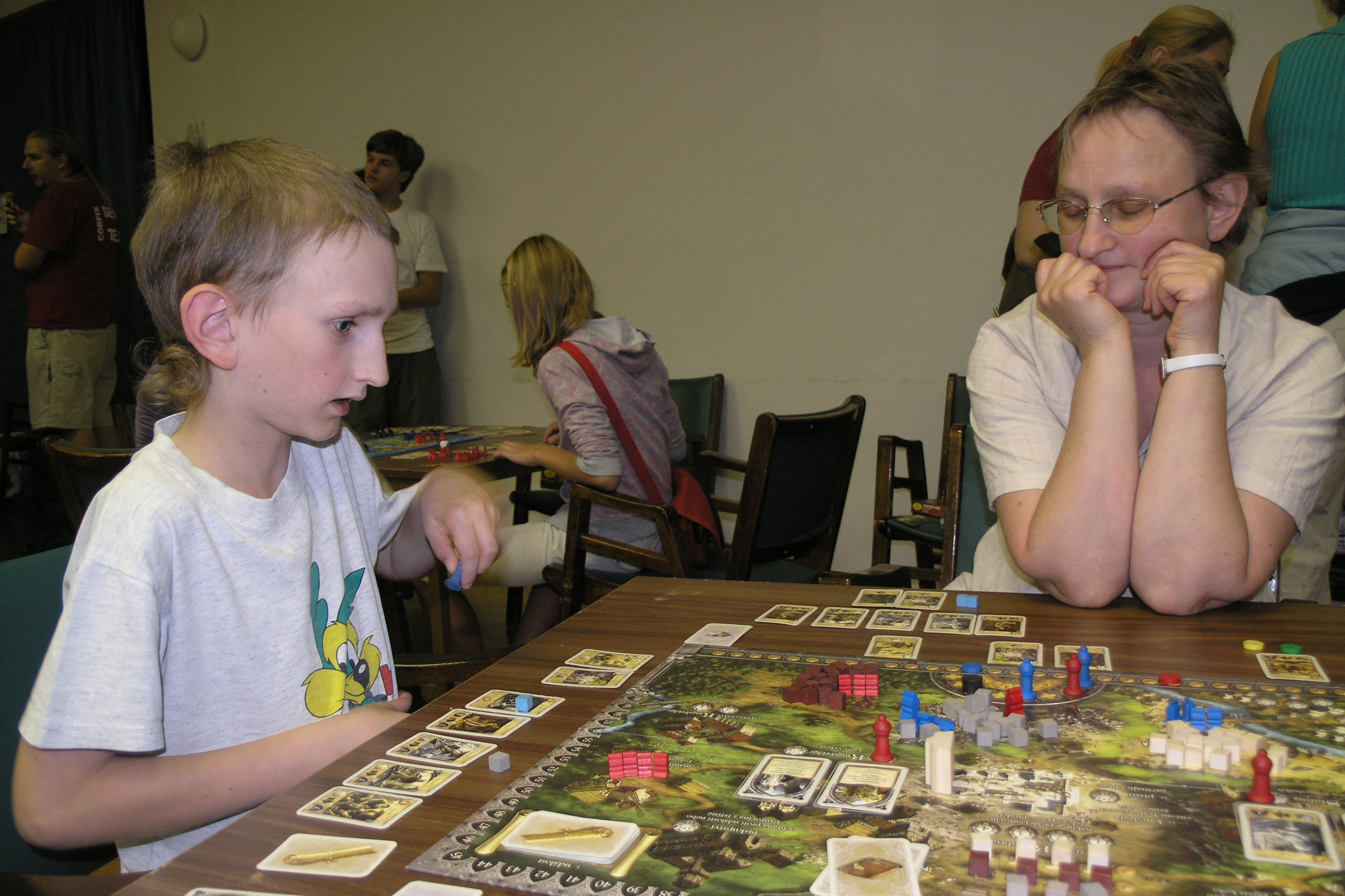 Hry a hlavolamy 2008 - festival her a hlavolamů v Praze, Holešovicích